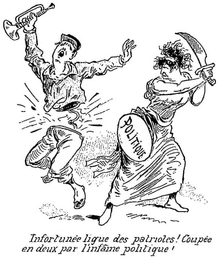 "Revue de l'année 1888, par Draner." (détail)